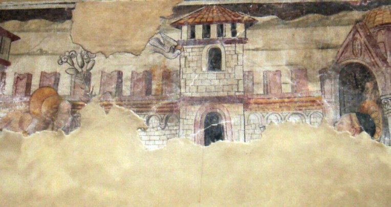 Conegliano (Treviso): affresco del sottoportico della casa del Re di Cipro (XV secolo), rappresentante un'Annunciazione.